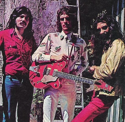 Banda Invisible. De izq a dcha: Carlos Alberto "Machi" Rufino, Luis Alberto Lorenzo, Juan Carlos "Pomo" Lorenzo. Revista Mordisco, nº 1, 1974.